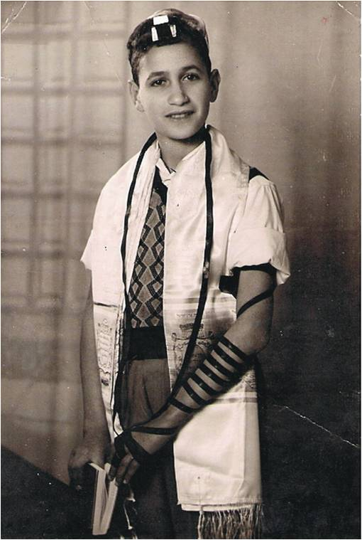 אורי לבוביץ ( 31 בינואר 1946 - 6 ביוני 1967) היה חייל צה"ל שעוטר בעיטור המופת על לחימתו בגבעת התחמושת במלחמת ששת הימים. לבוביץ היה חובש קרבי שעוטר על דבקות במשימה. במשך כל הלחימה, טיפל בפצועים, גם באלה שנפגעו, ושכבו במקומות חשופים והיו תחת ירי של הליגיון הירדני. לבוביץ נהרג בעת שטיפל בשני חיילים פצעים. הוא נקבר בבית הקברות הצבאי בהר הרצל. בתמונה אורי לבוביץ בחגיגת בר מצווה